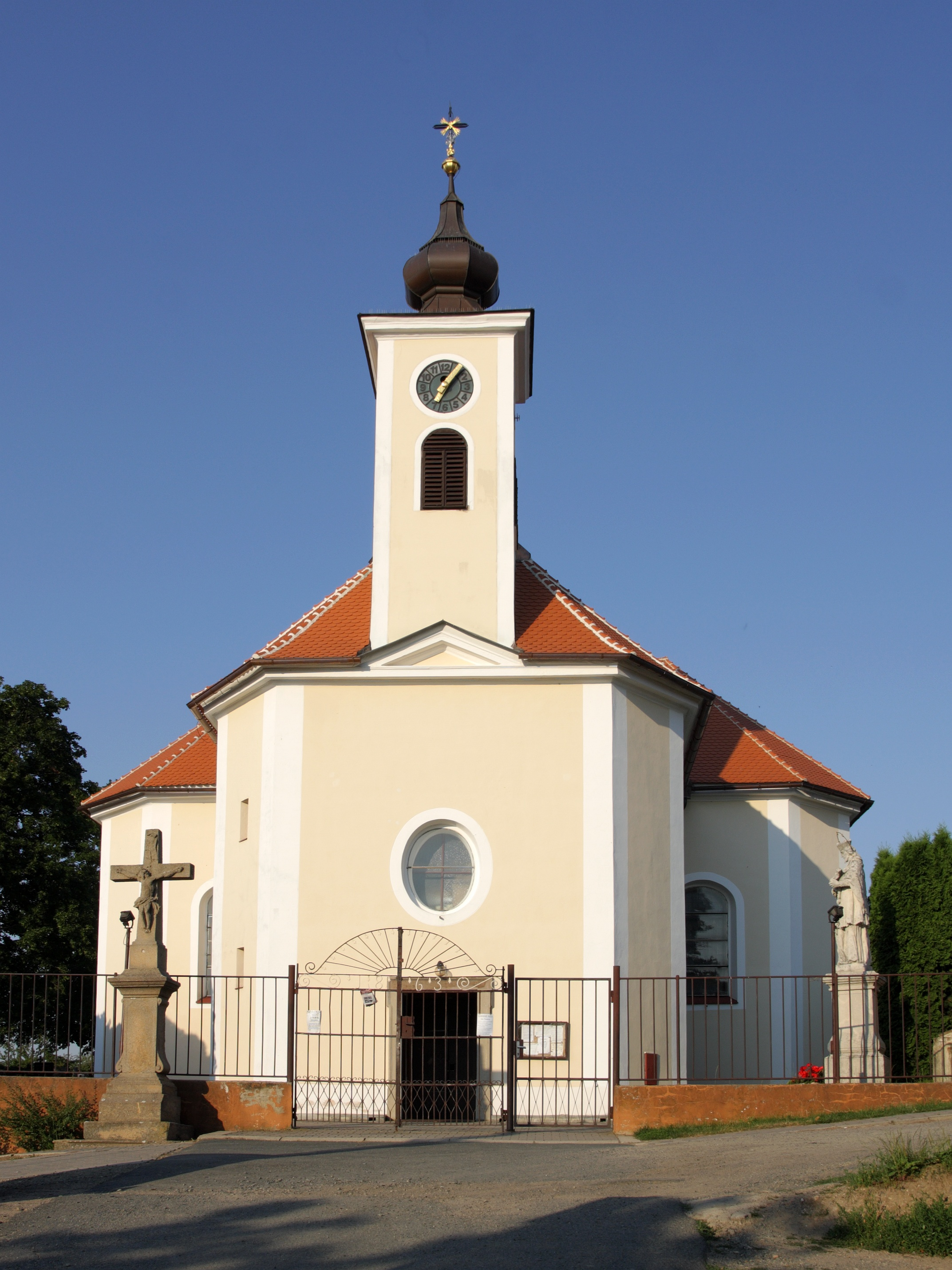 Syrovice - Kostel svatého Augustina.